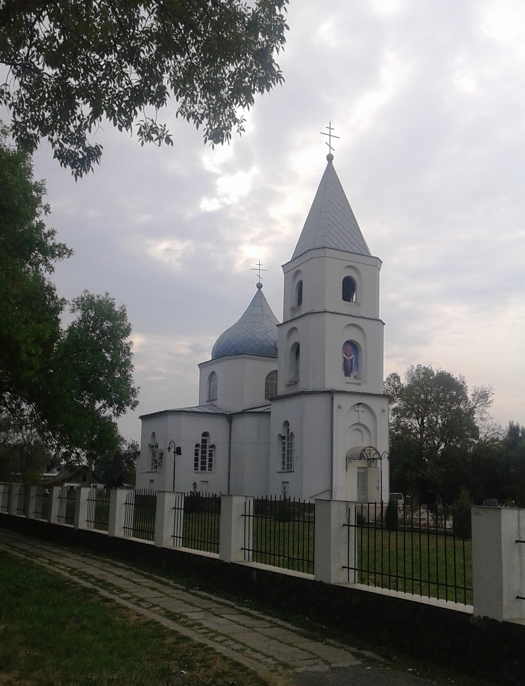 Вікіекспедиція у Буджак